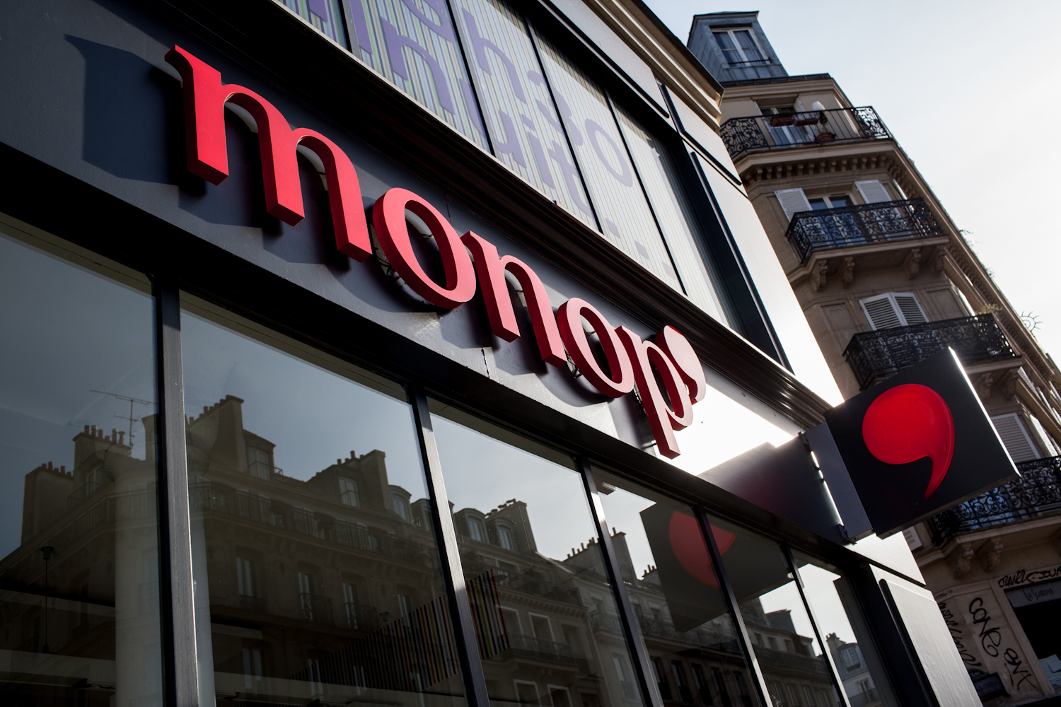 Enseigne du Monop' (définitivement fermé, remplacé par une autre enseigne de supermarché), 34 rue de Rivoli, IVe arrondissement, Paris, France.